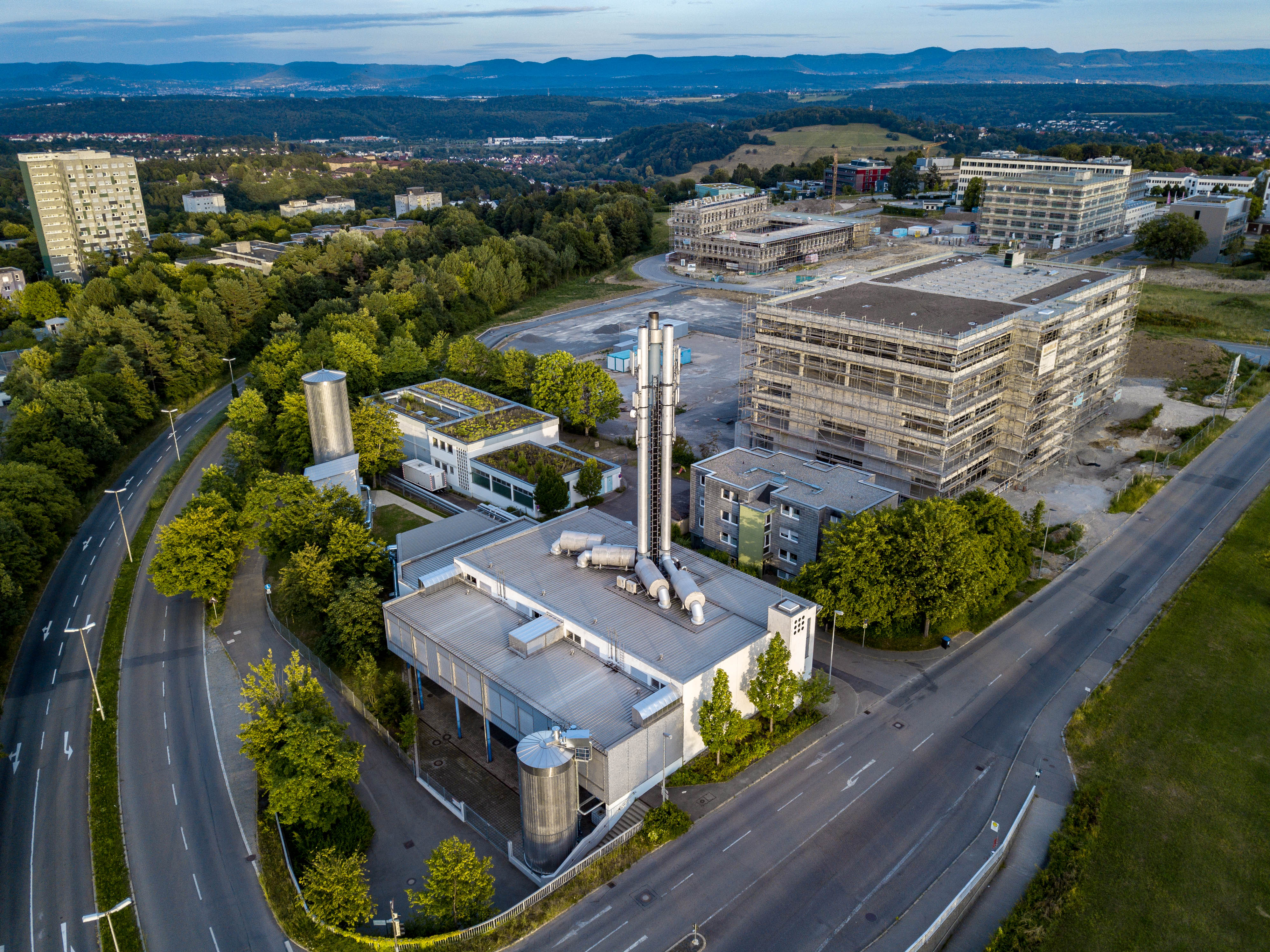 Tübingen. Blockheizkraftwerk Obere Viehweide in der Waldhäuser Straße Ecke Nordring.